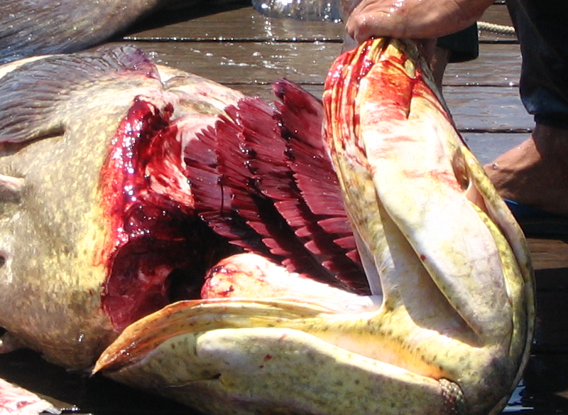 Detail of Image:Kourou port fishermen mérou.jpg